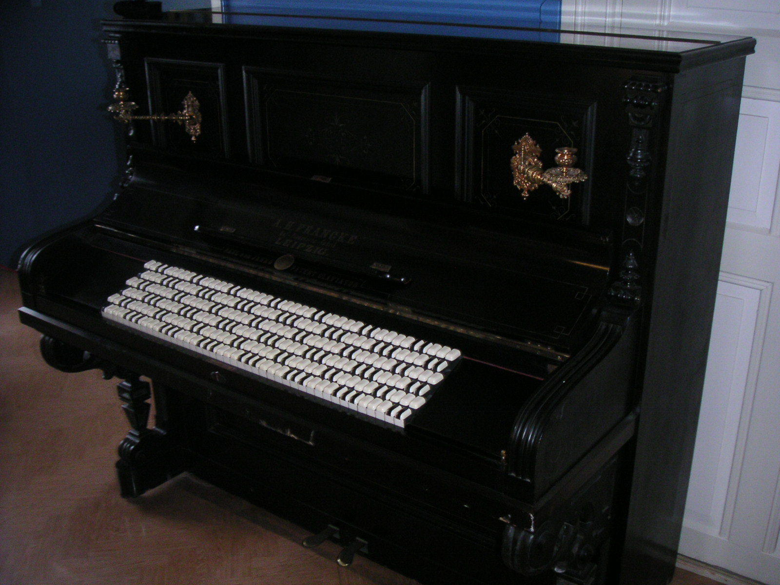 Janko piano / Janko keyboard /Janko klaviatur